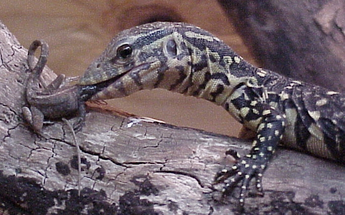 Varan du Nil mangeant un anole brun Anolis sagrei Photo personnelle.